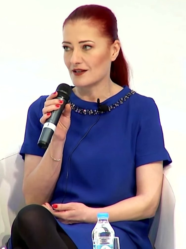 Türkiye’yi Büyüten Kadınlar Buluşması: Fark Yaratan Kadınlar Söyleşisi'nde Candan Erçetin konuşurken